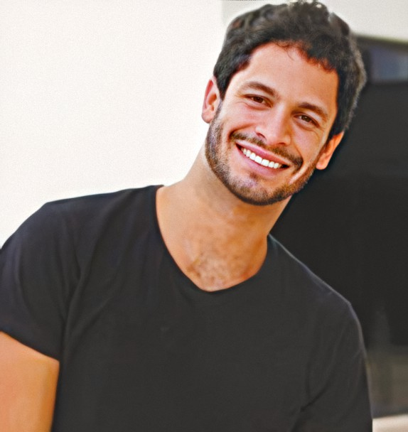 O ator brasileiro (brasiliense) Rainer Cadete, flagrado na Torre Digital, em Brasília